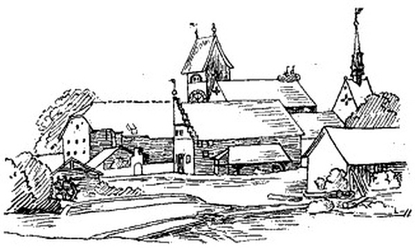 Kloster Rüti, Rüti ZH. Rechts von der Kirche, nordwestlich vorgestellt, Dach und Dachreiter wahrscheinlich der von Elisabeth von Matsch 1437/39 erbauten Toggenburger Kapelle. Zeichnung von Konrad Meyer, Ansicht um 1650.